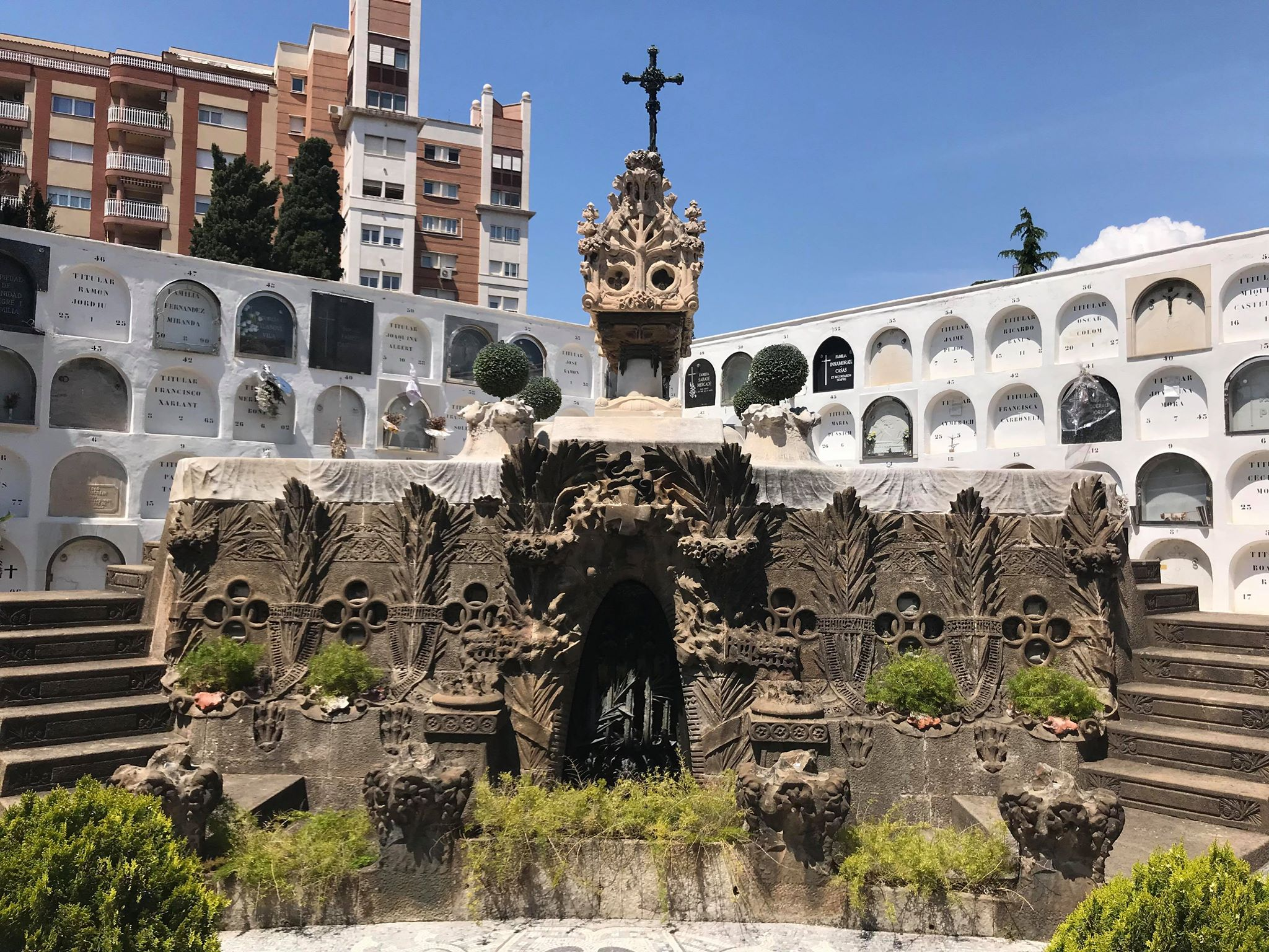 Panteó de la família Bosch, obra modernista de Joan Amigó i Barriga. Permís d'obra sol·licitat el 1907 per Llúcia Costa, esposa de Vicenç Bosch i Grau, creador de l'Anís del Mono.